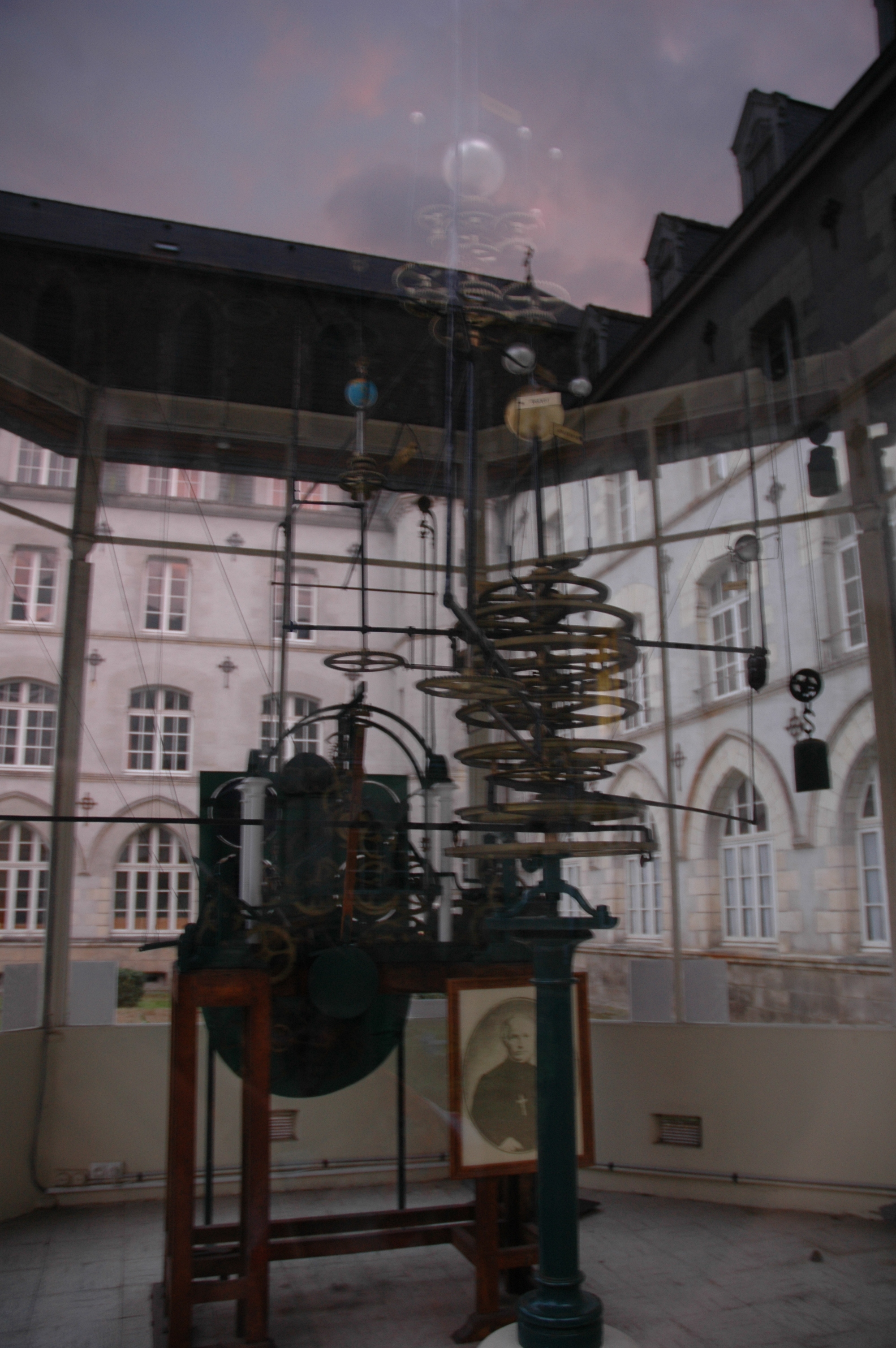 Ploërmel (Morbihan, France) - Horloge astronomique construite entre 1850 et 1855 par le frère Bernardin Morin (1812-1876), protégée par un kiosque vitré dans la cour de la Maison-Mère des Frères de Ploërmel (actuel Lycée La Mennais).